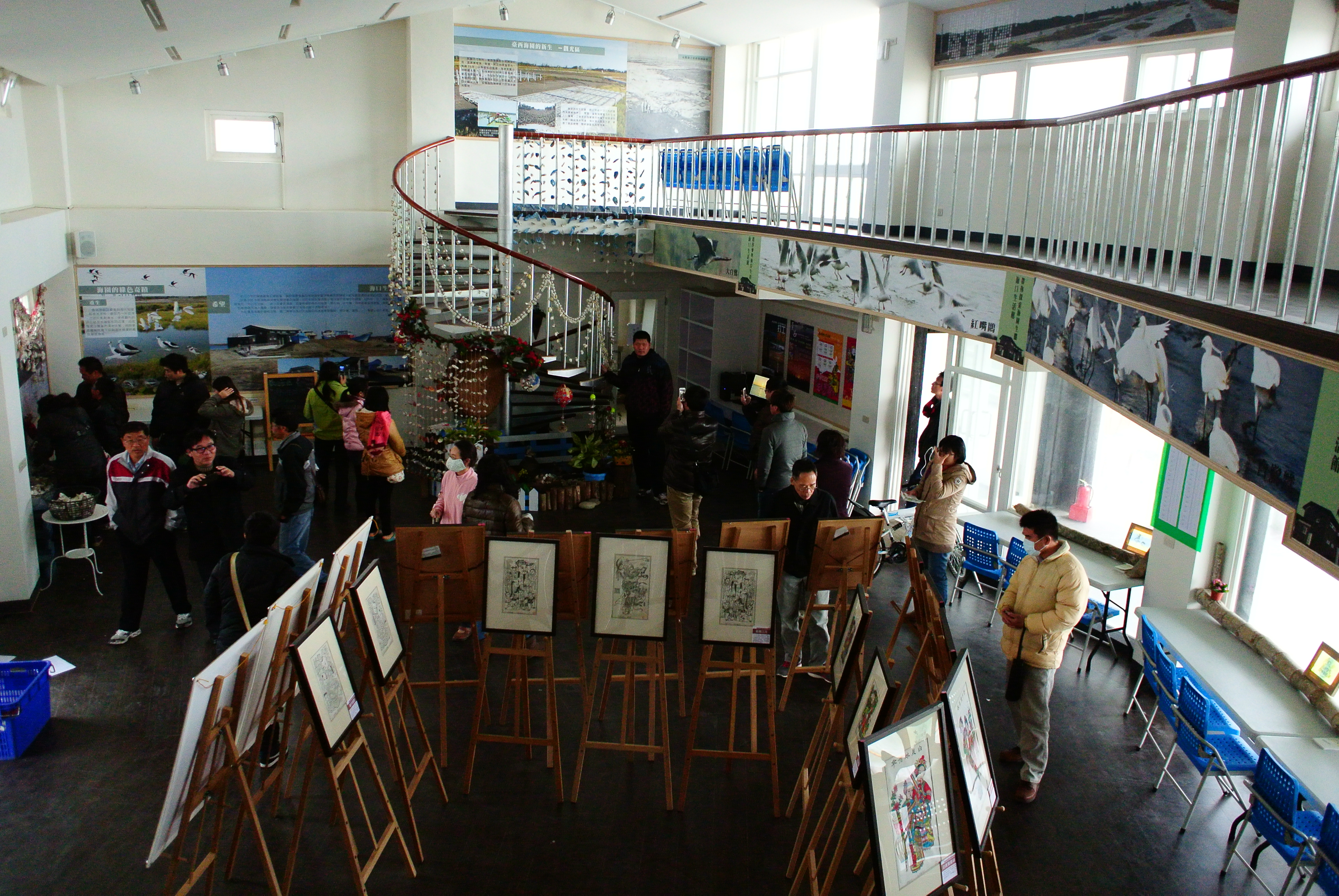 中文（台灣）: 雲林縣臺西鄉臺西海口生活館。